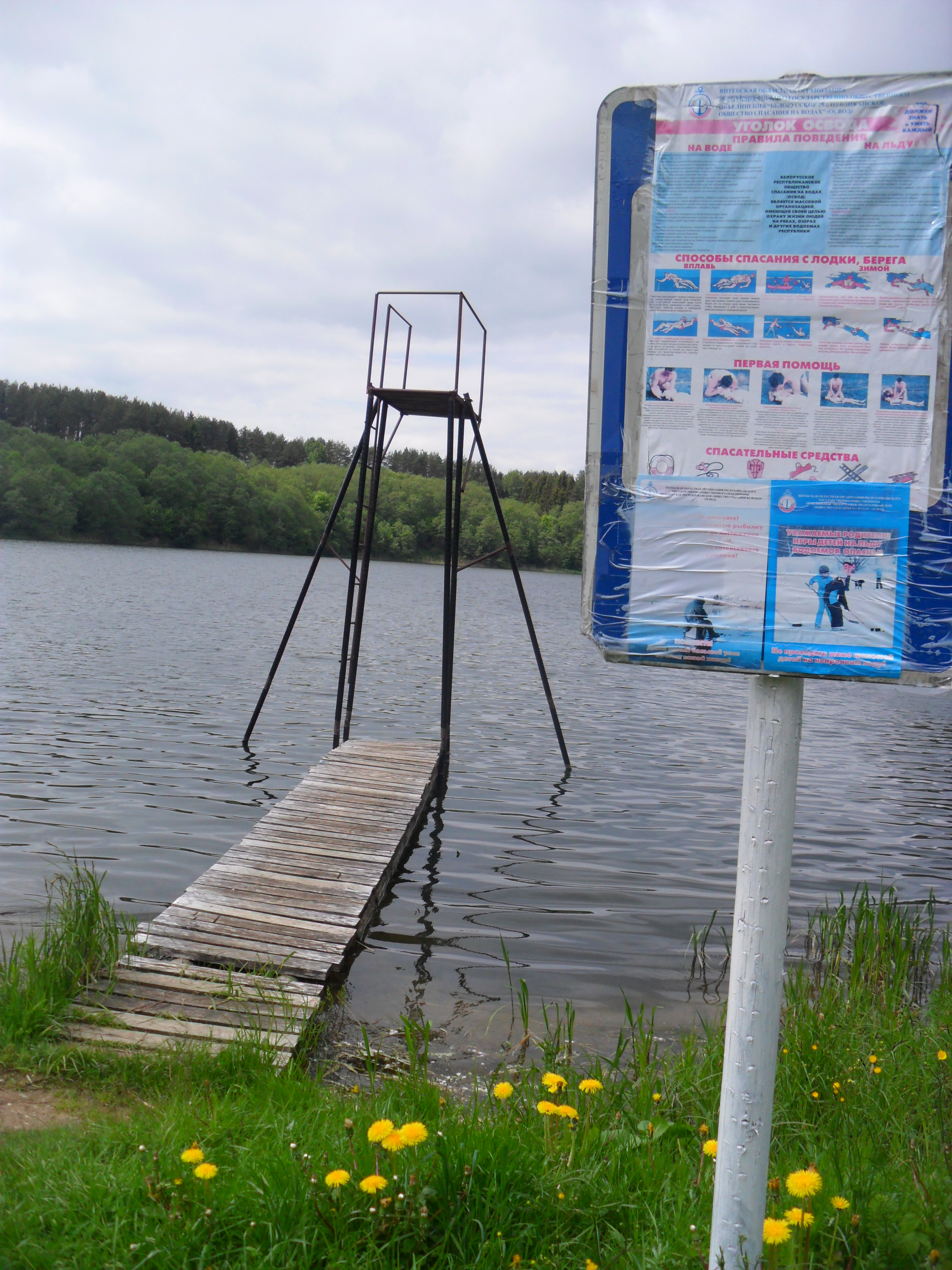 Возера Разван